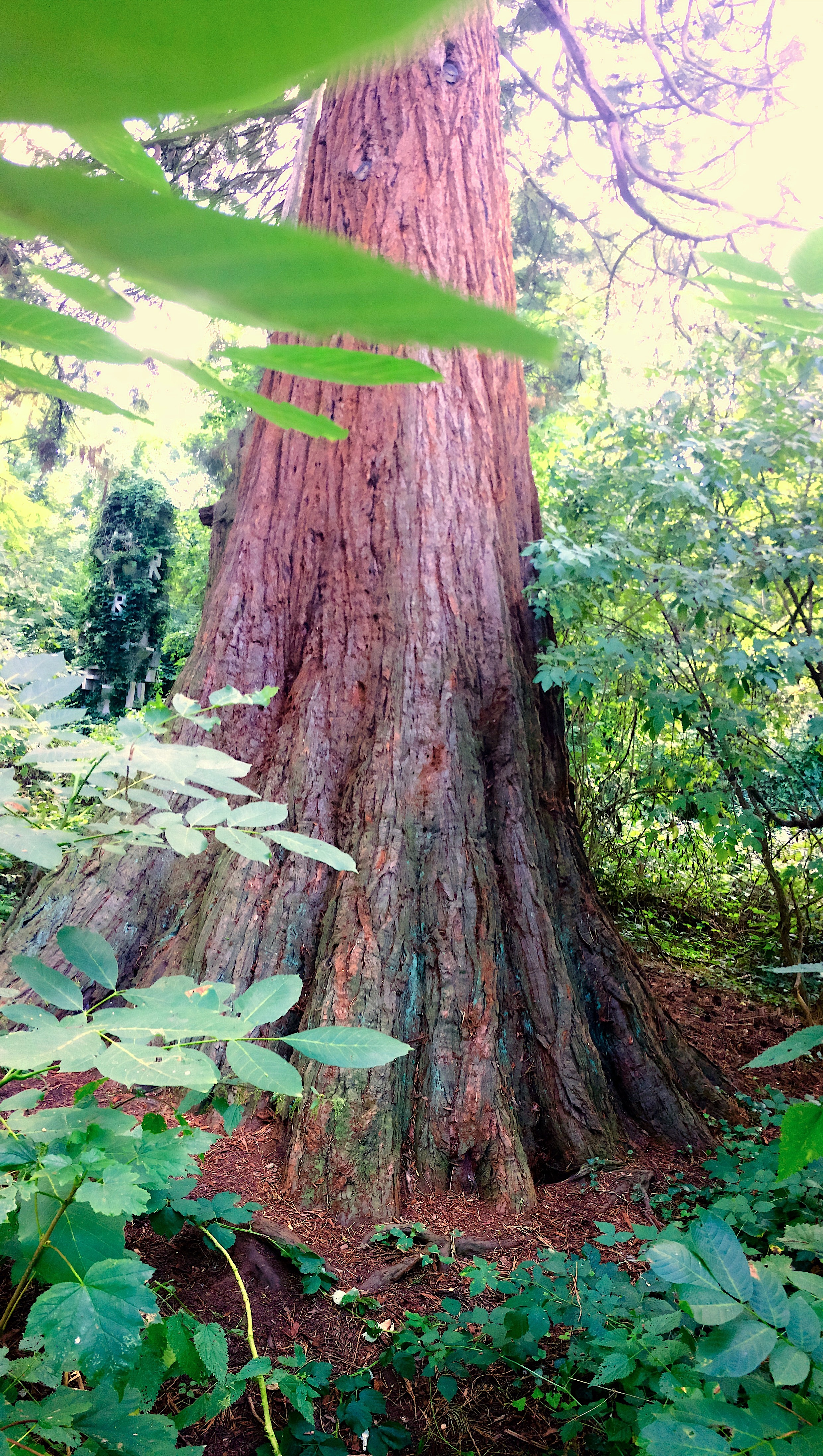 Sequoia im Hentzenpark Rolandswerth (geheime gärten rolandswerth)